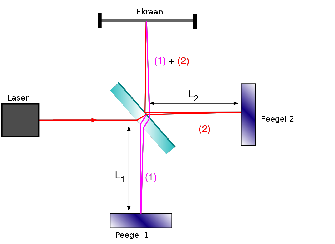 MIchelsoni interferomeetri skeem